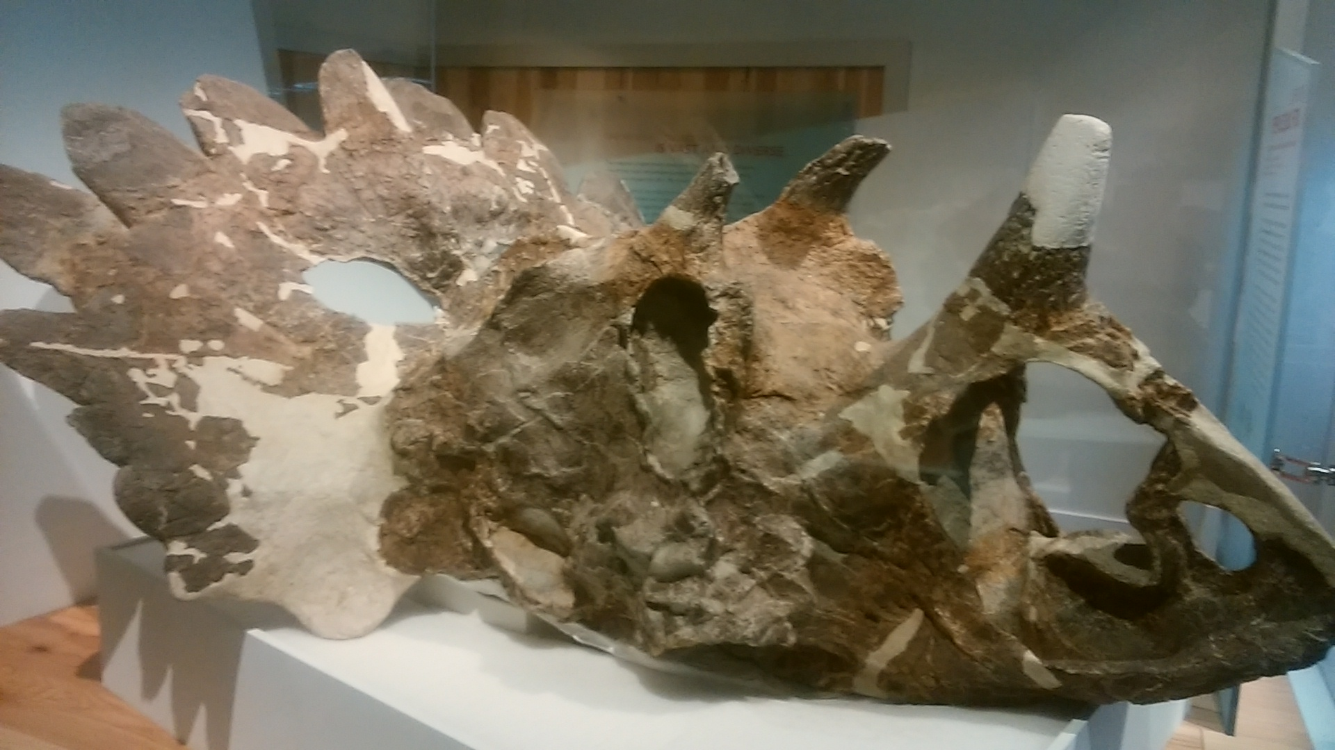 横から見たレガリケラトプス・ペテルヘウシ（ロイヤル・ティレル古生物学博物館所蔵）